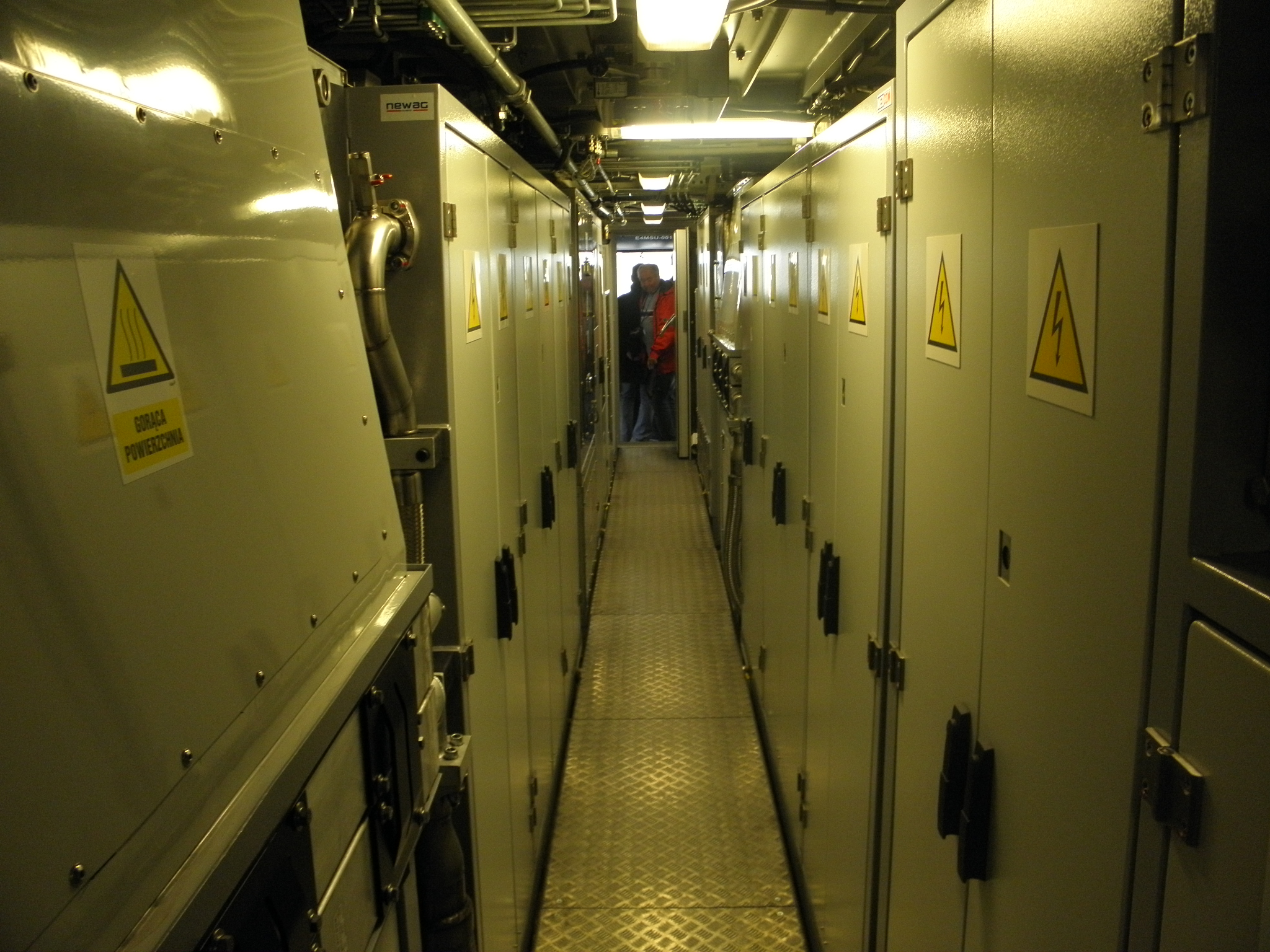 Photo from Trako 2013, Gdańsk/Danzig